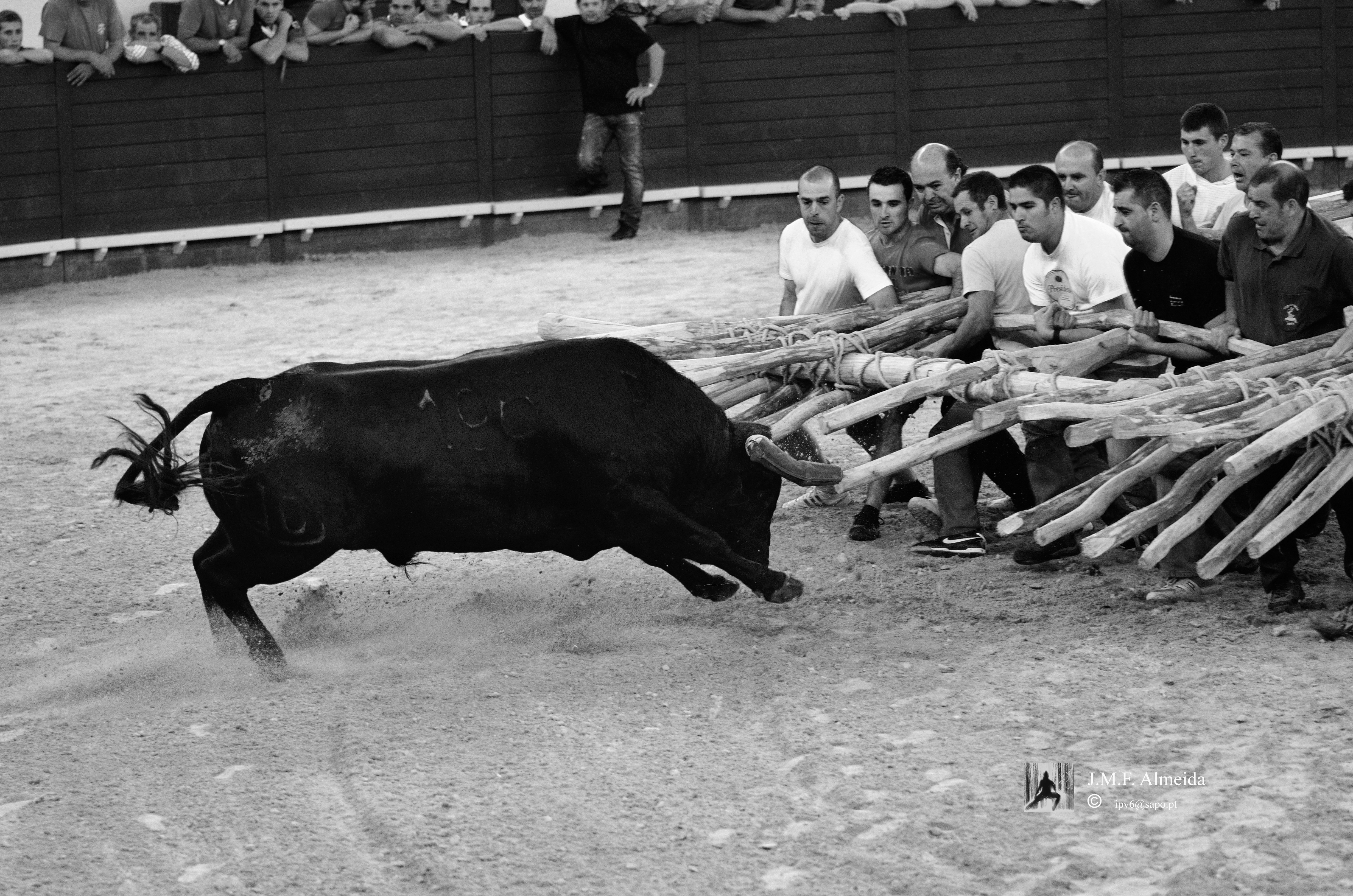 Campo Pequeno - 2.6.2012 - XXXIV Capeia Arraiana